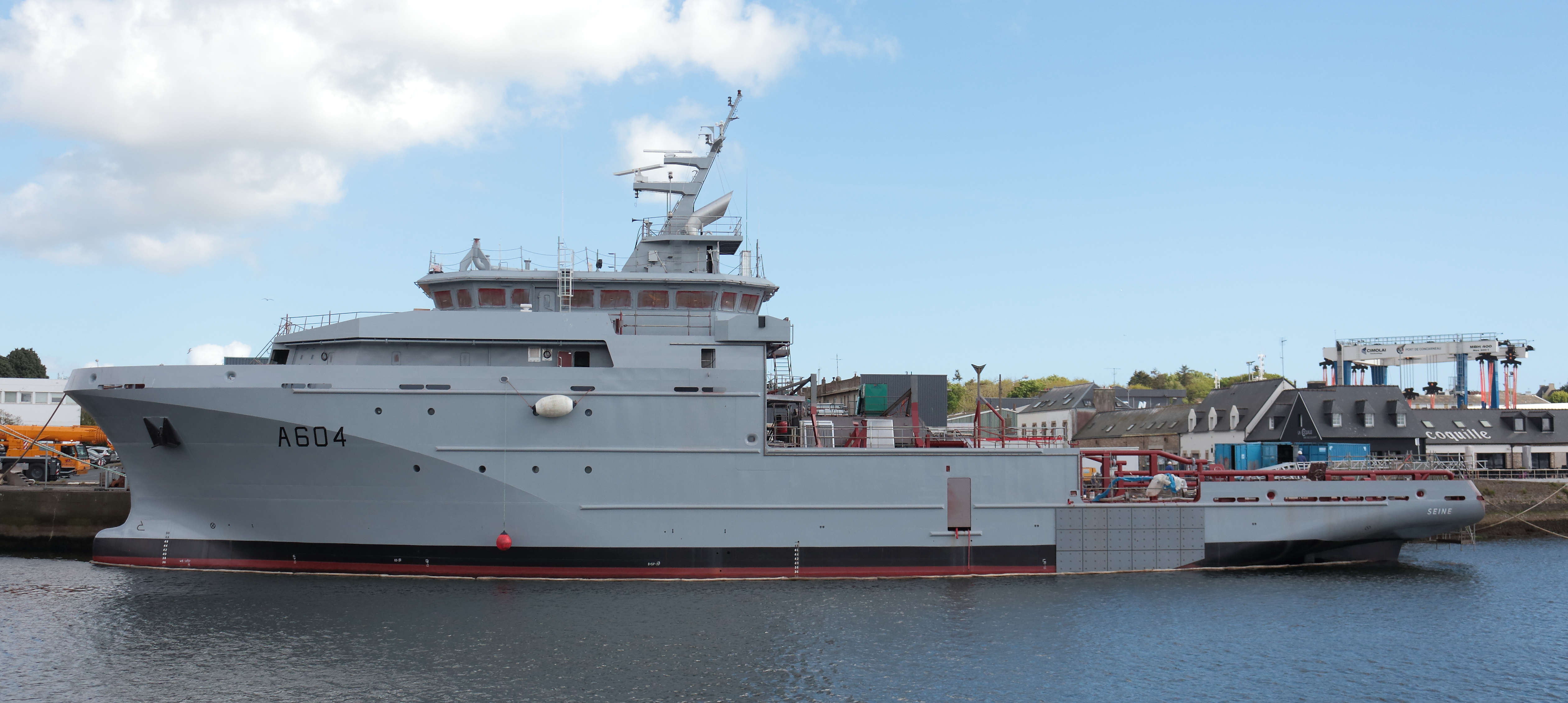 Le BSAH Seine en cours de finition dans le port de Concarneau, Finistère, Bretagne, France.